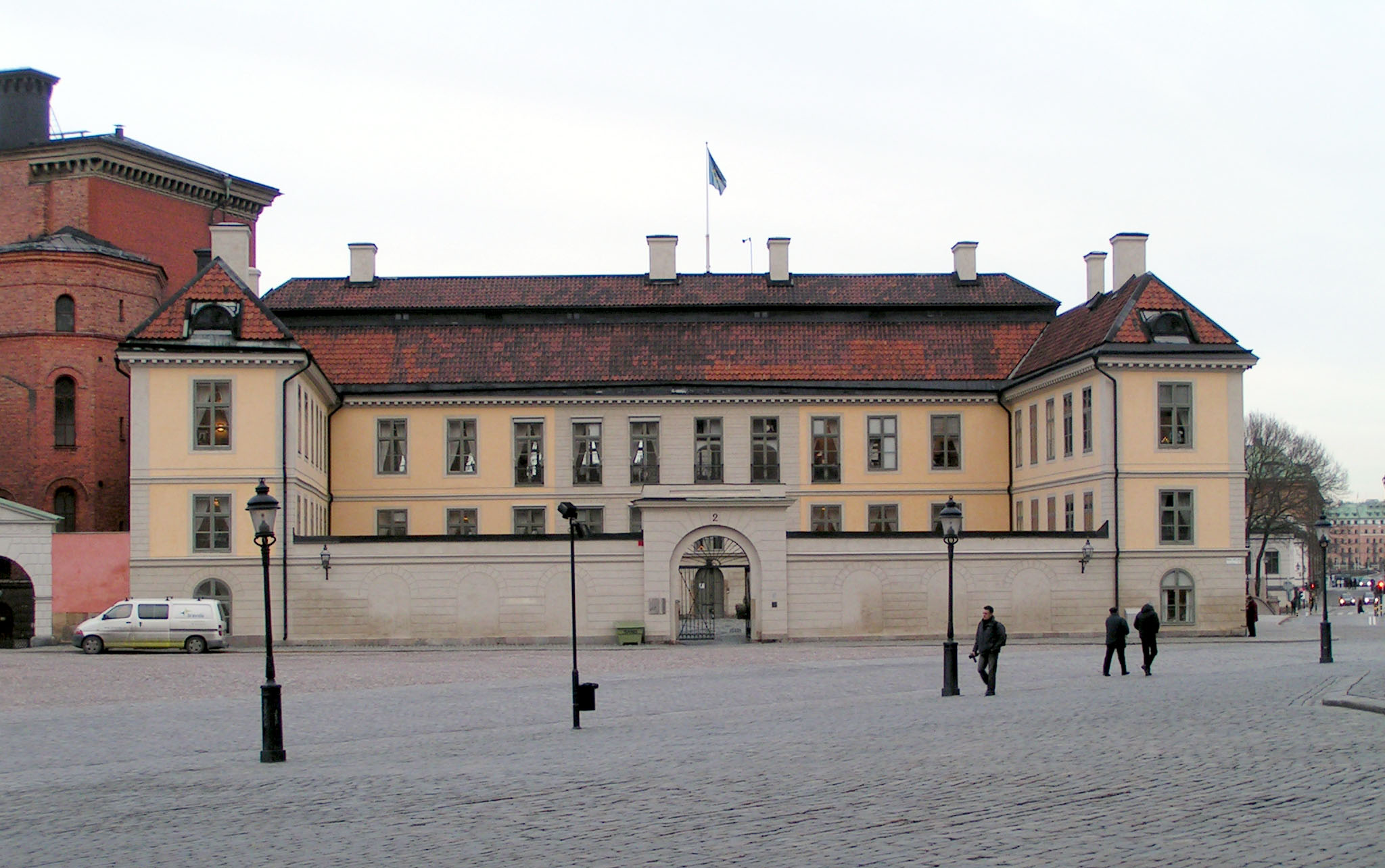 Hessensteinska palatset, Riddarholmen, Stockholm